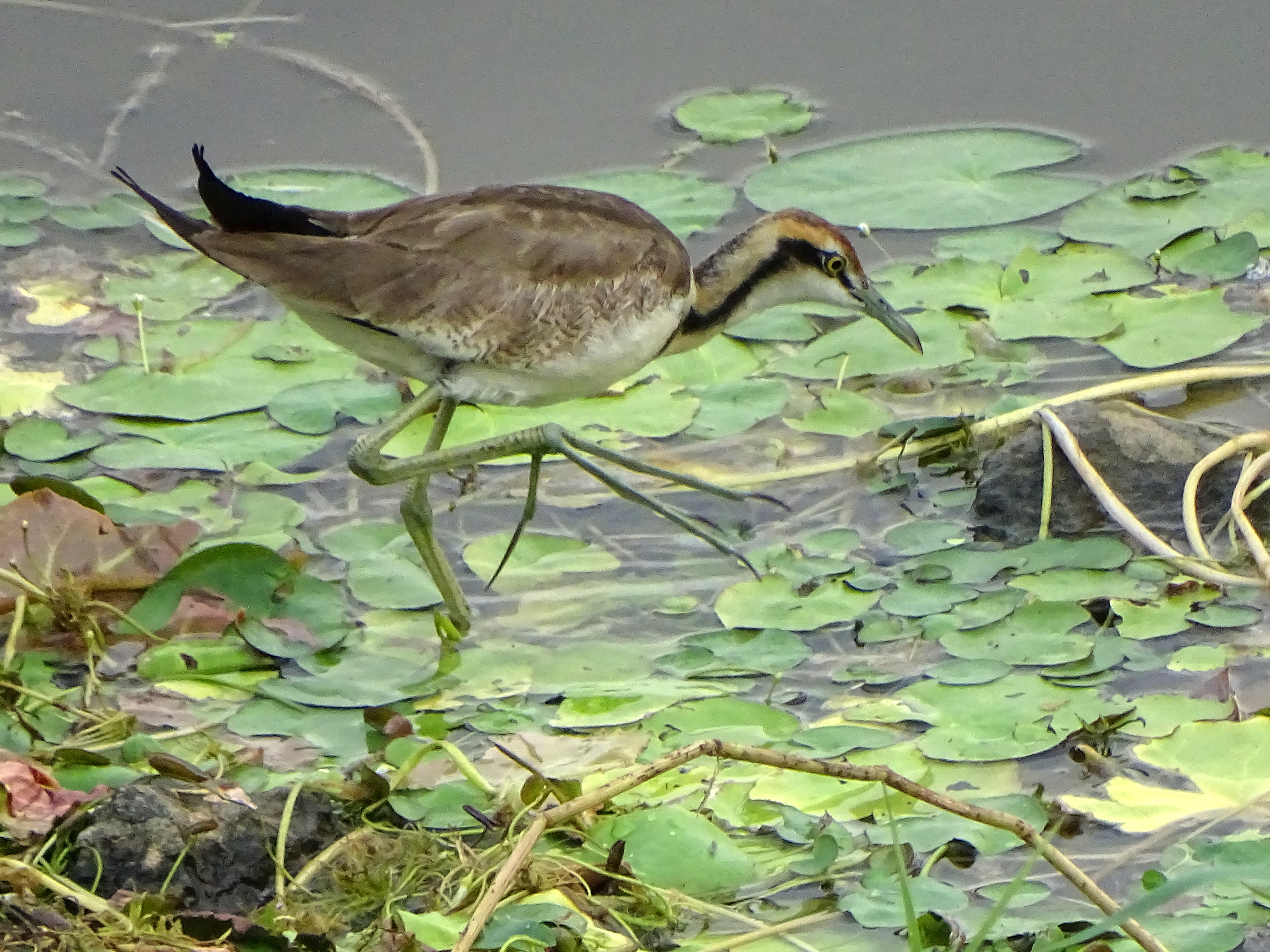 വാലൻ താമരക്കോഴി. പാലക്കാട് ജില്ലയിലെ തൃത്താലയിൽ നിന്നുമാണ് പ്രജനനേതര വേഷത്തിലുള്ള ഈ പക്ഷിയുടെ ചിത്രം എടുത്തത്